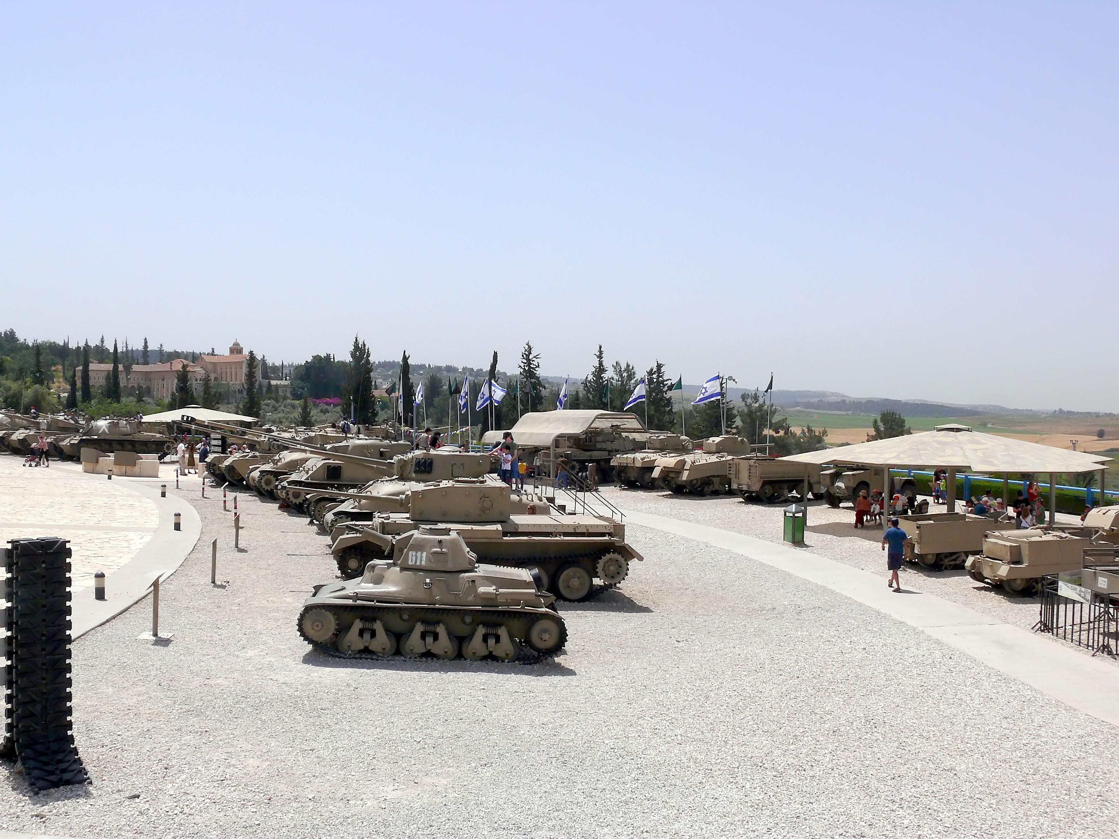 Yad LaShirion, Latrun, Israel יד לשריון, לטרון, ישראל